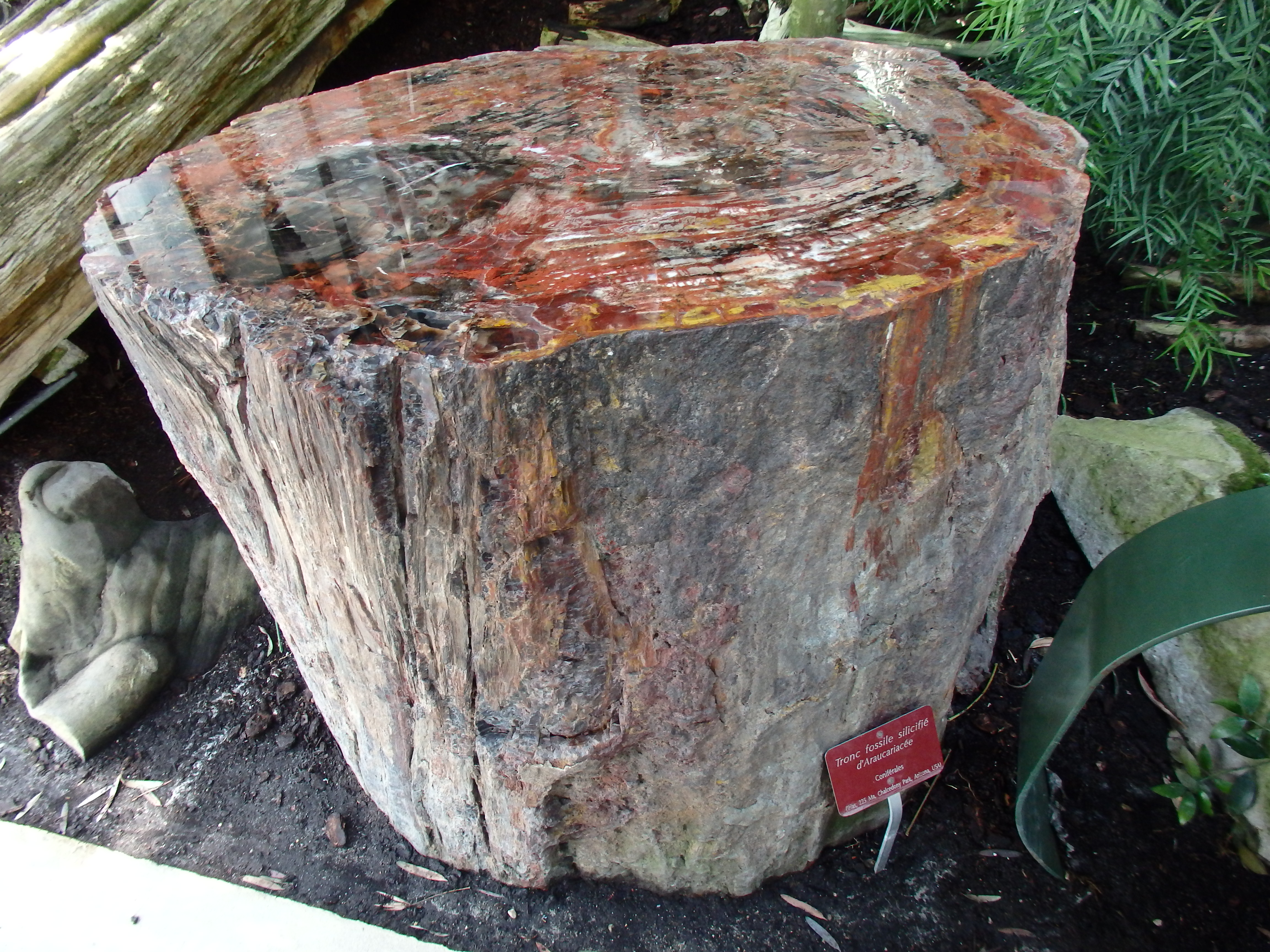 Orto botanico di Parigi